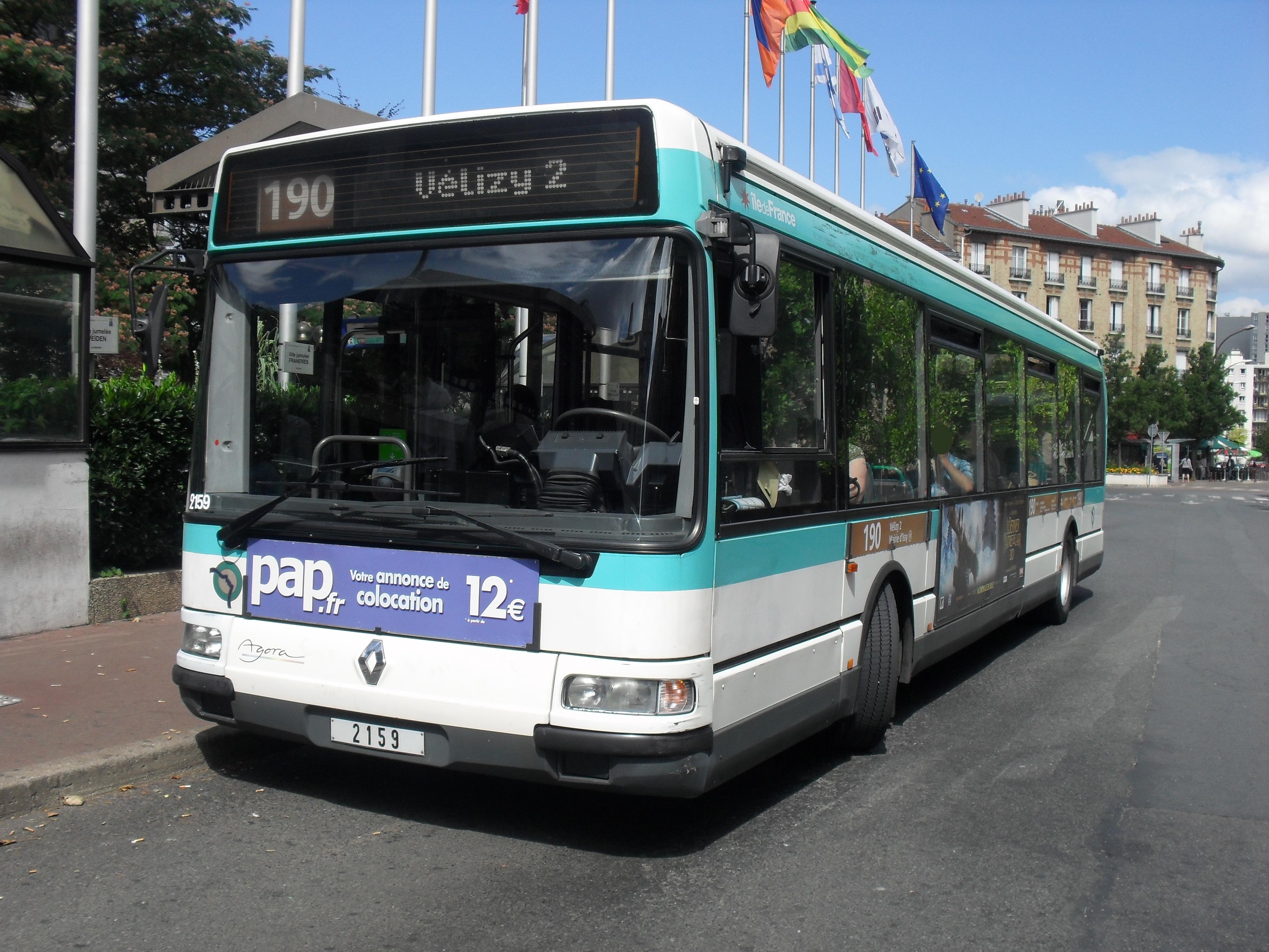 Ligne RATP 190, ici au terminus Mairie d'Issy.